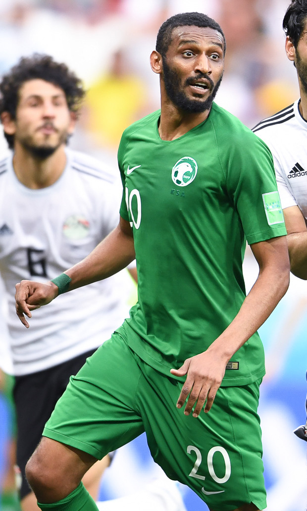 Египет с Салахом проиграл Саудовской Аравии